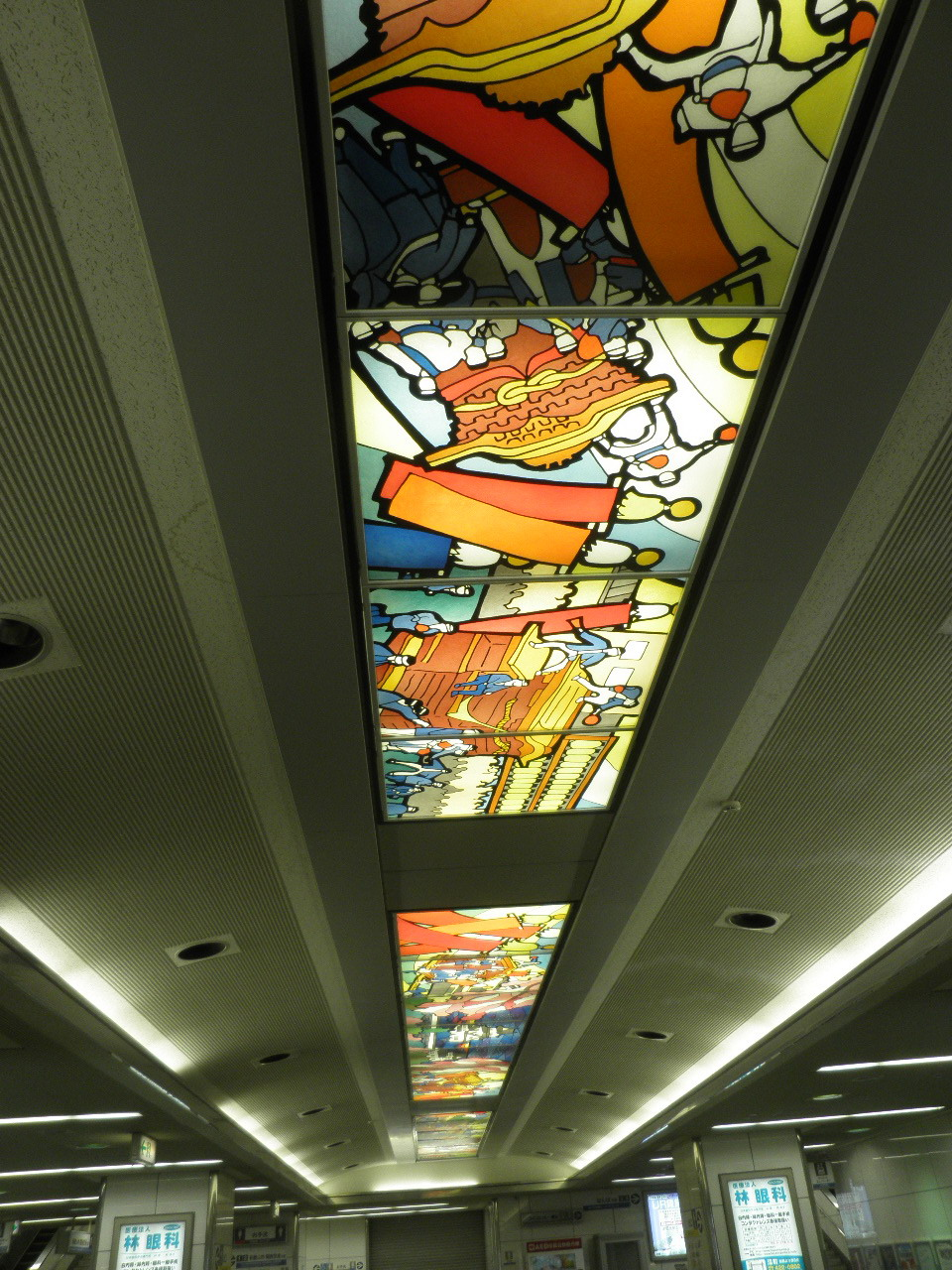 コンコースにあるだんじりのステンドグラス